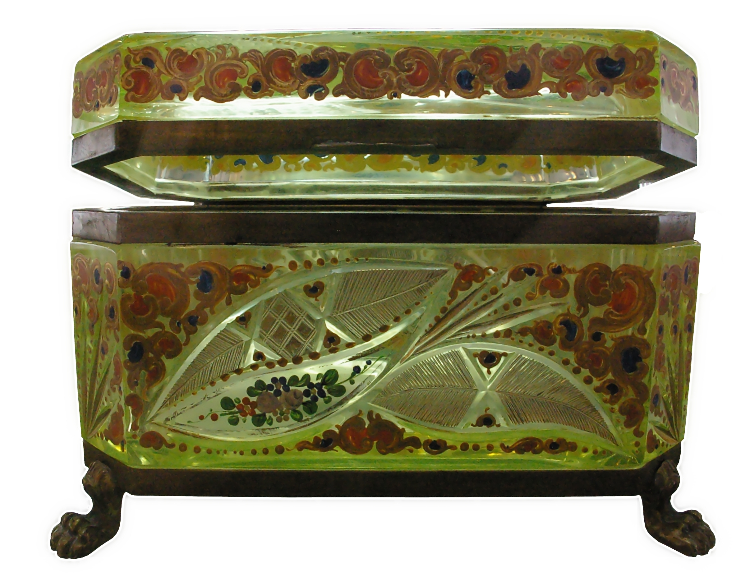 Jewel box, qajar era (19th c.) Azerbaijan Museum, Tabriz (Iran).